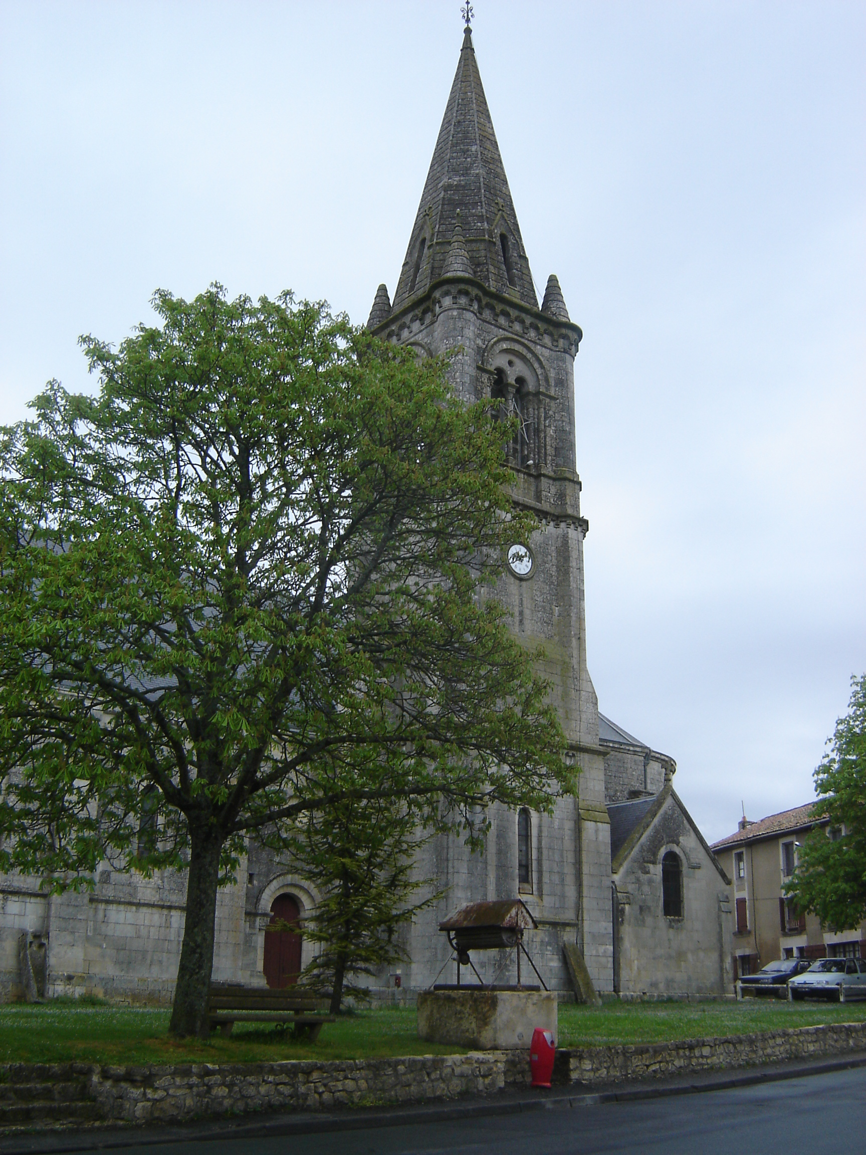 Eglise Notre-Dame-de-Montamisé